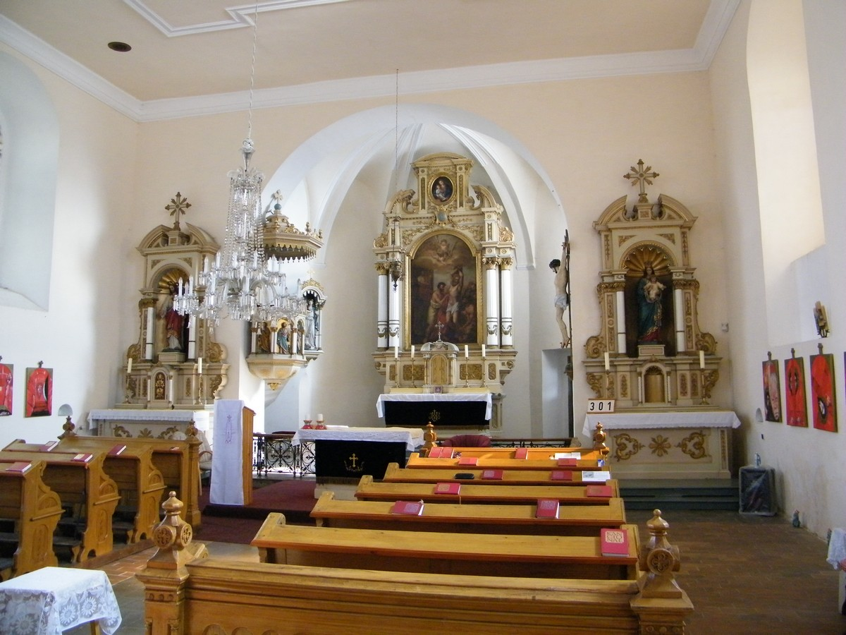 Kostel svatého Bartoloměje ve Velkém Šenově, interiér